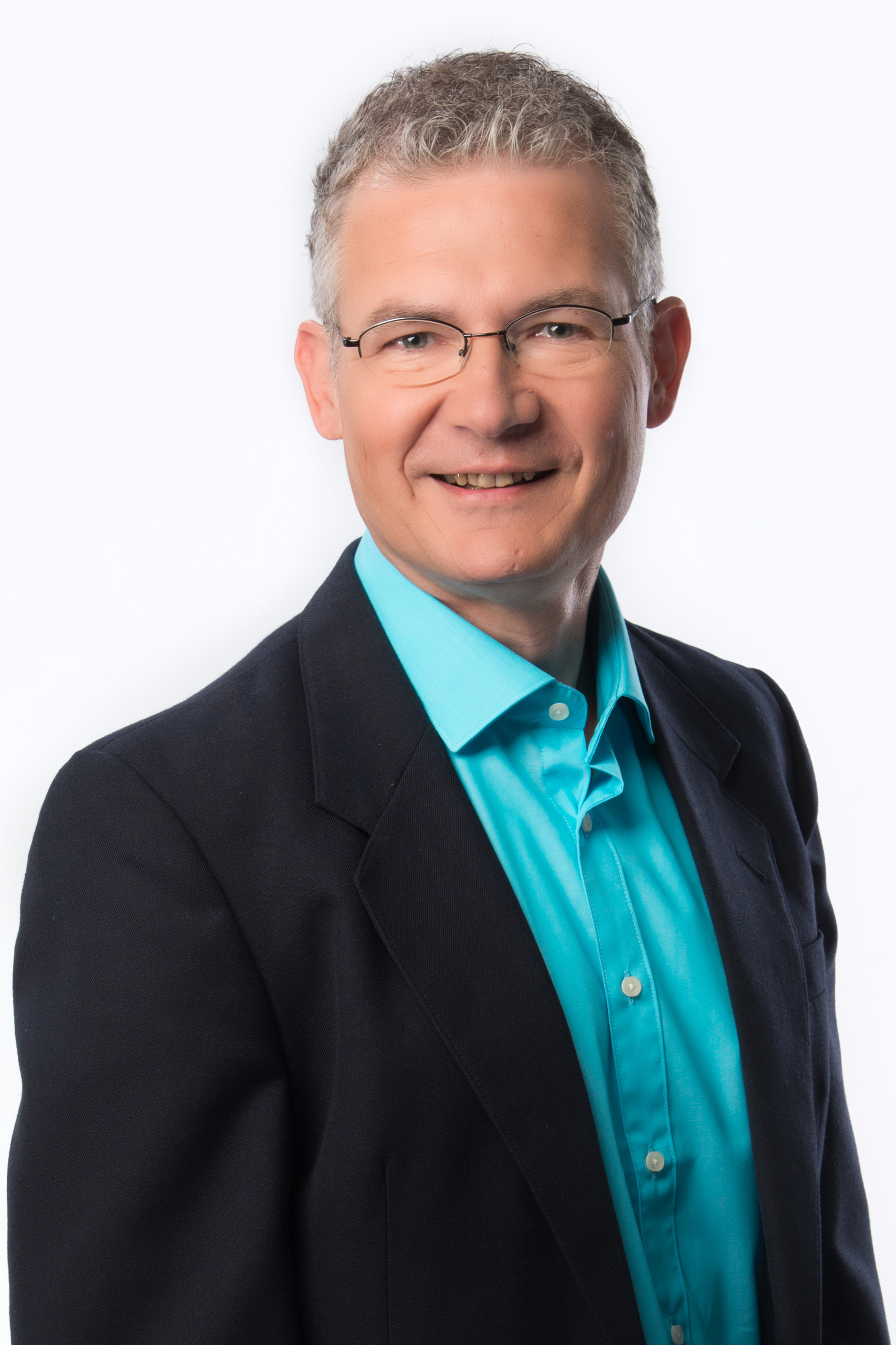 Foto: DIE LINKE. Brandenburg